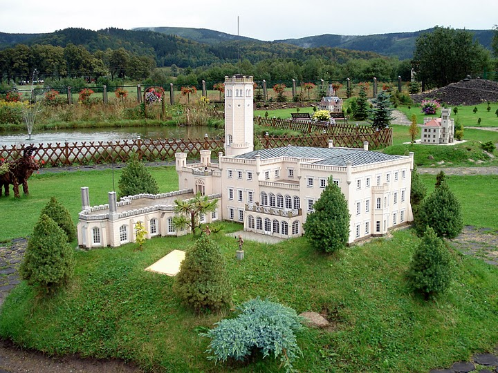 Kowary - Park Miniature